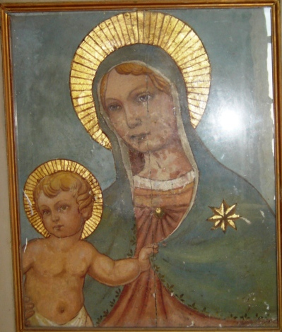 Immagine della Vergine miracolosa di S. Maria in Ferrata - Rapolano Terme (SI)- Autore Marco Del Pasqua 21.7.2007. Foto effettuata dall'autore su gentile concessione del Vicariato Apostolico di Rapolano e Castelnuovo Berardenga.